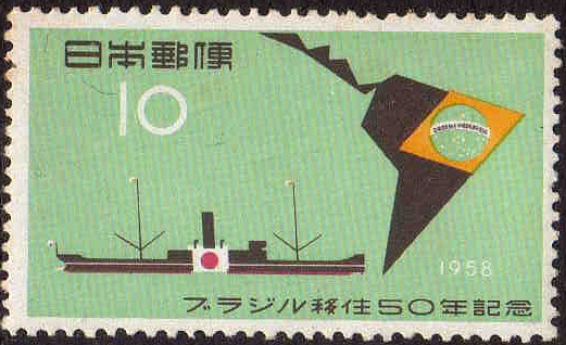 日本からブラジルへの移民開始50周年を記念して発行された記念切手。